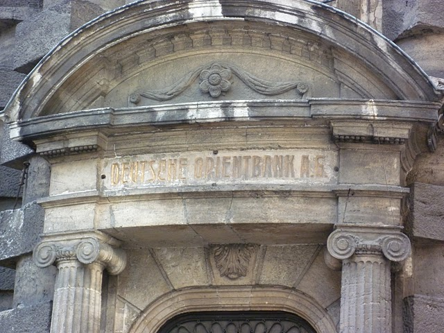 Haupteingang der Istanbuler Niederlassung der Deutschen Orientbank AG